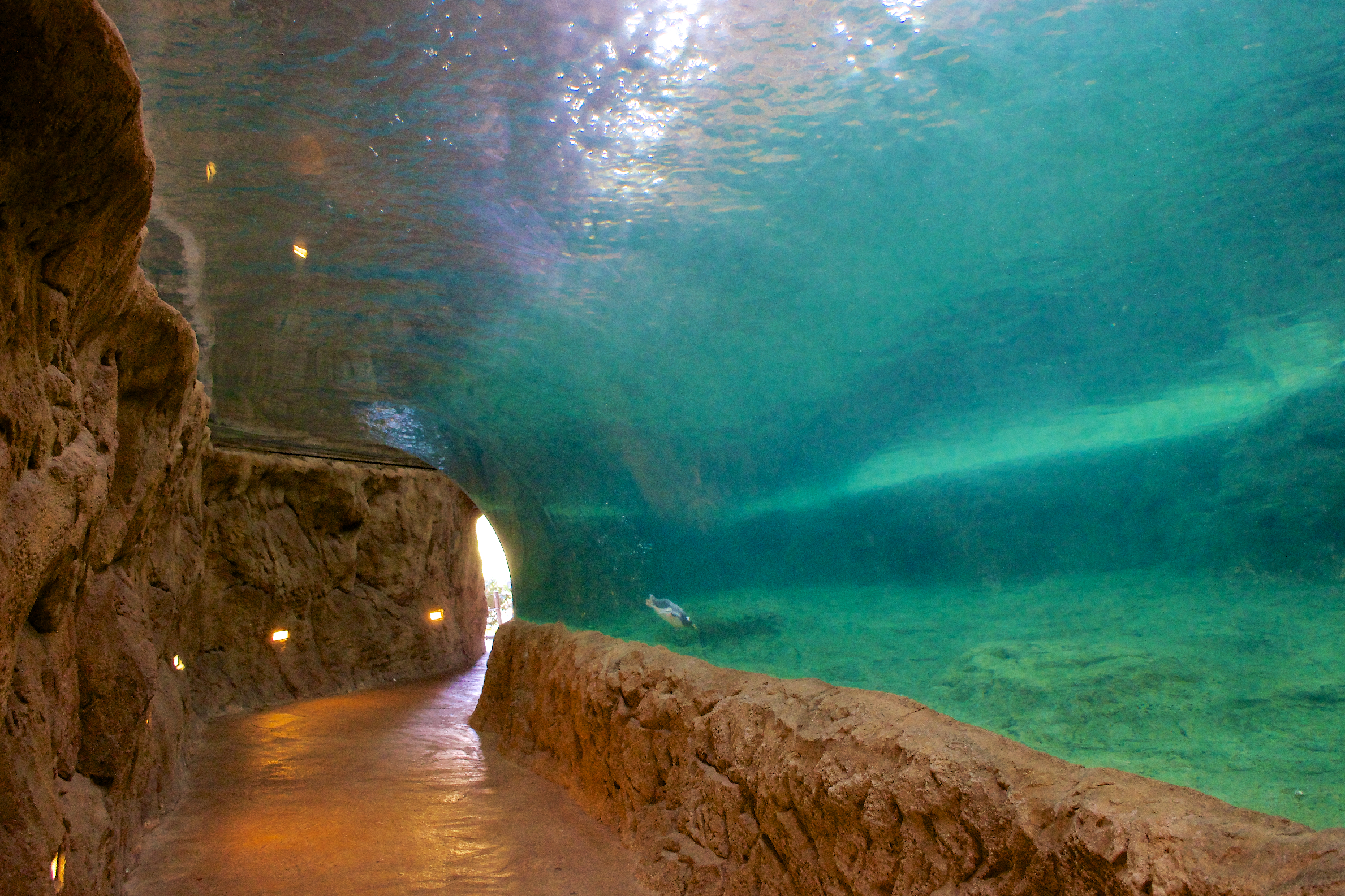 Acrylglas-Tunnel unter der Königspinguinanlage im Zoo Wuppertal